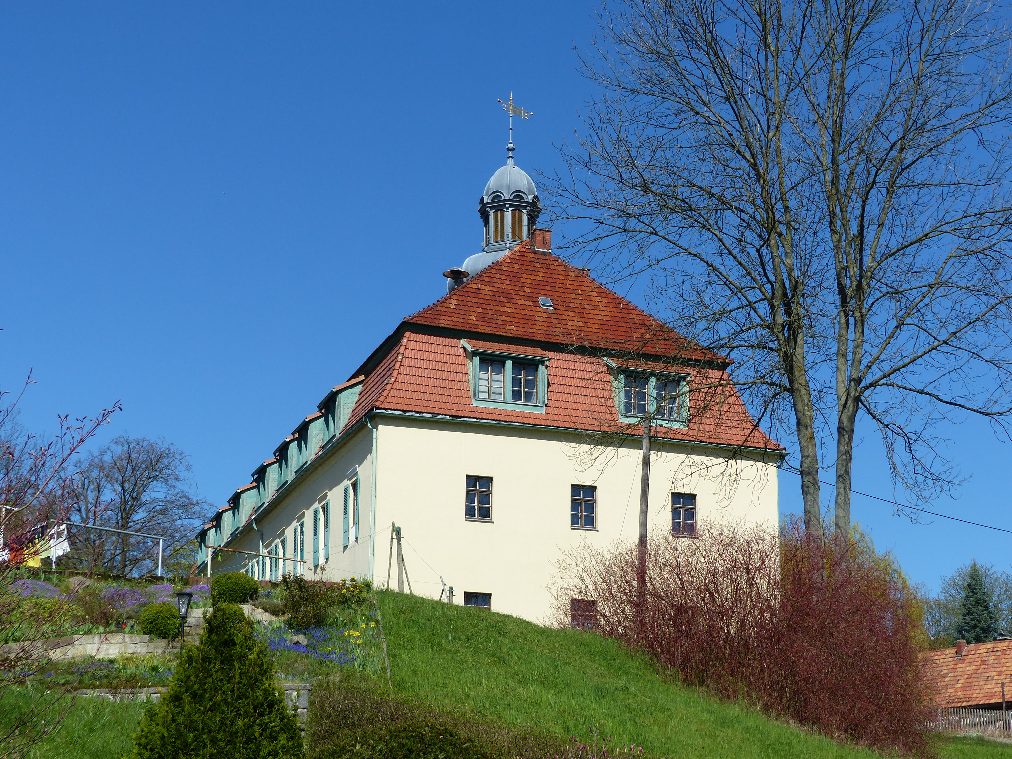 Denkmalgeschütztes Gebäude, Ehemal. Rittergut Oberulbersdorf, Am Schloß 1, Ulbersdorf (Hohnstein)